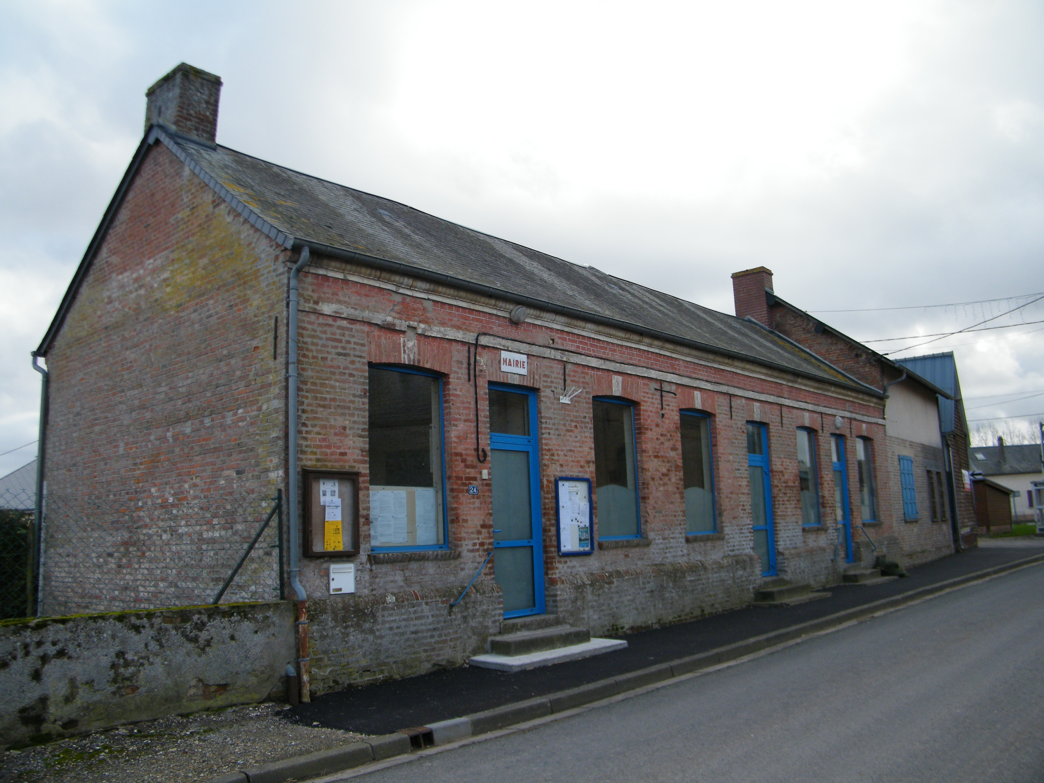 Epaumesnil, Somme, Fr , mairie